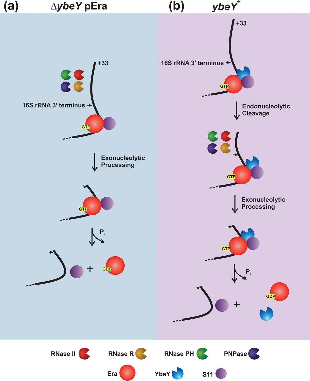 16S rRNA 3'otsa protsessimine (a) ilma ybeY geenita, aga Era ületootmisega (b) metsiktüpi bakteris